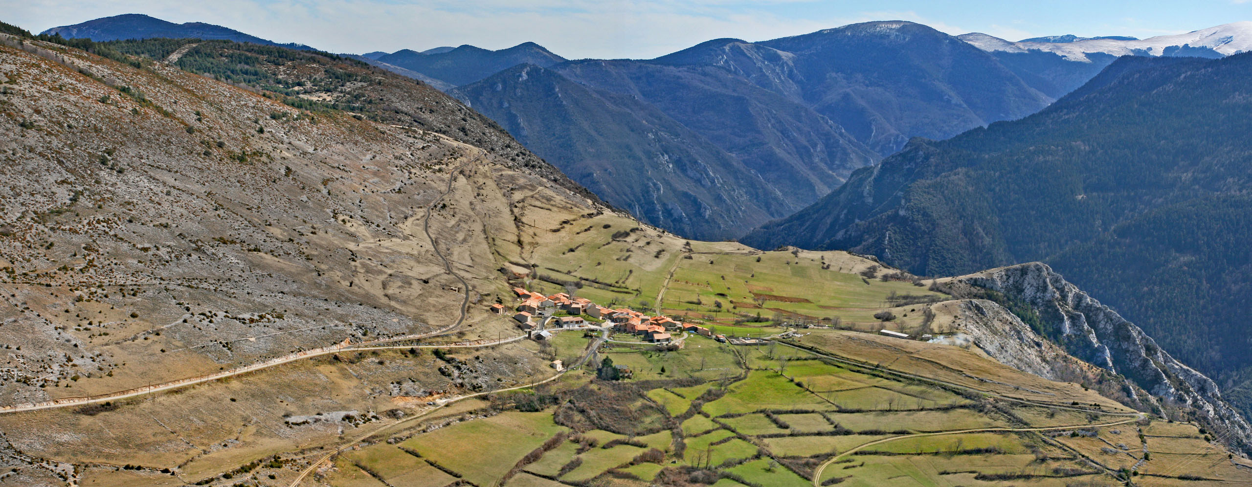 Panoramique